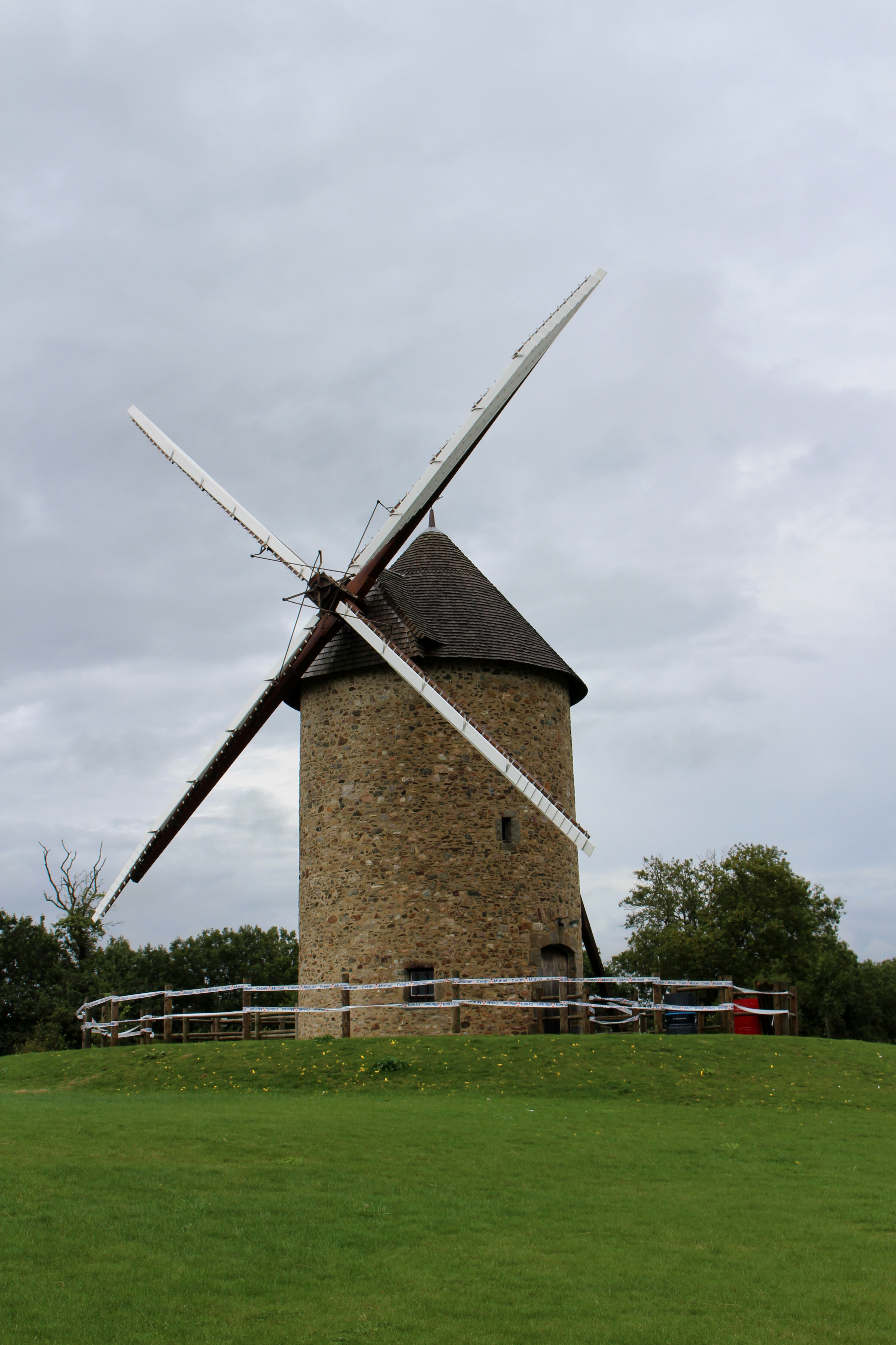 Moulin à vent de Gouville-sur-Mer Restauré en 2010